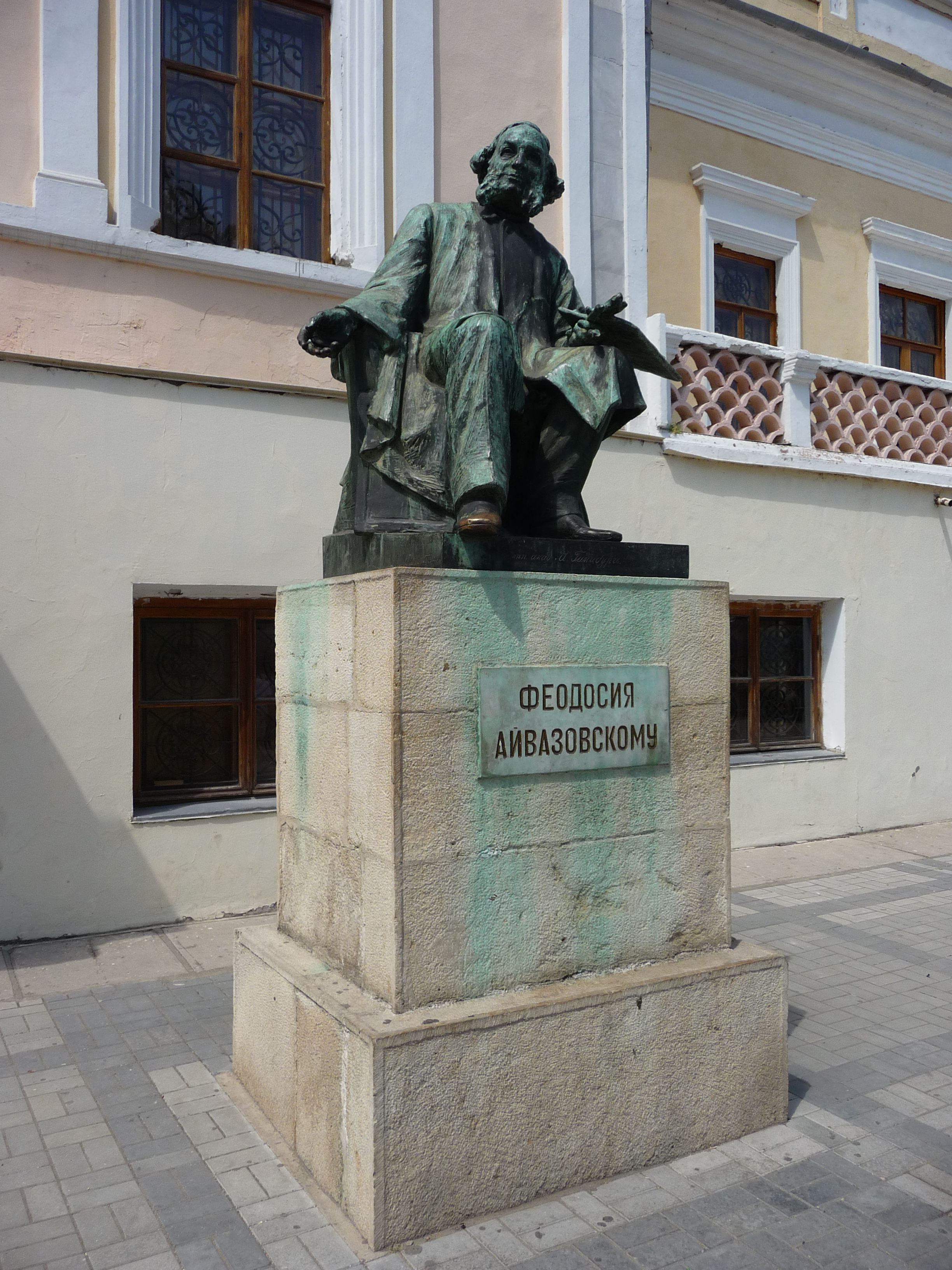 Пам'ятник І. К. Айвазовському, Феодосія, пр-т Айвазовського, 21